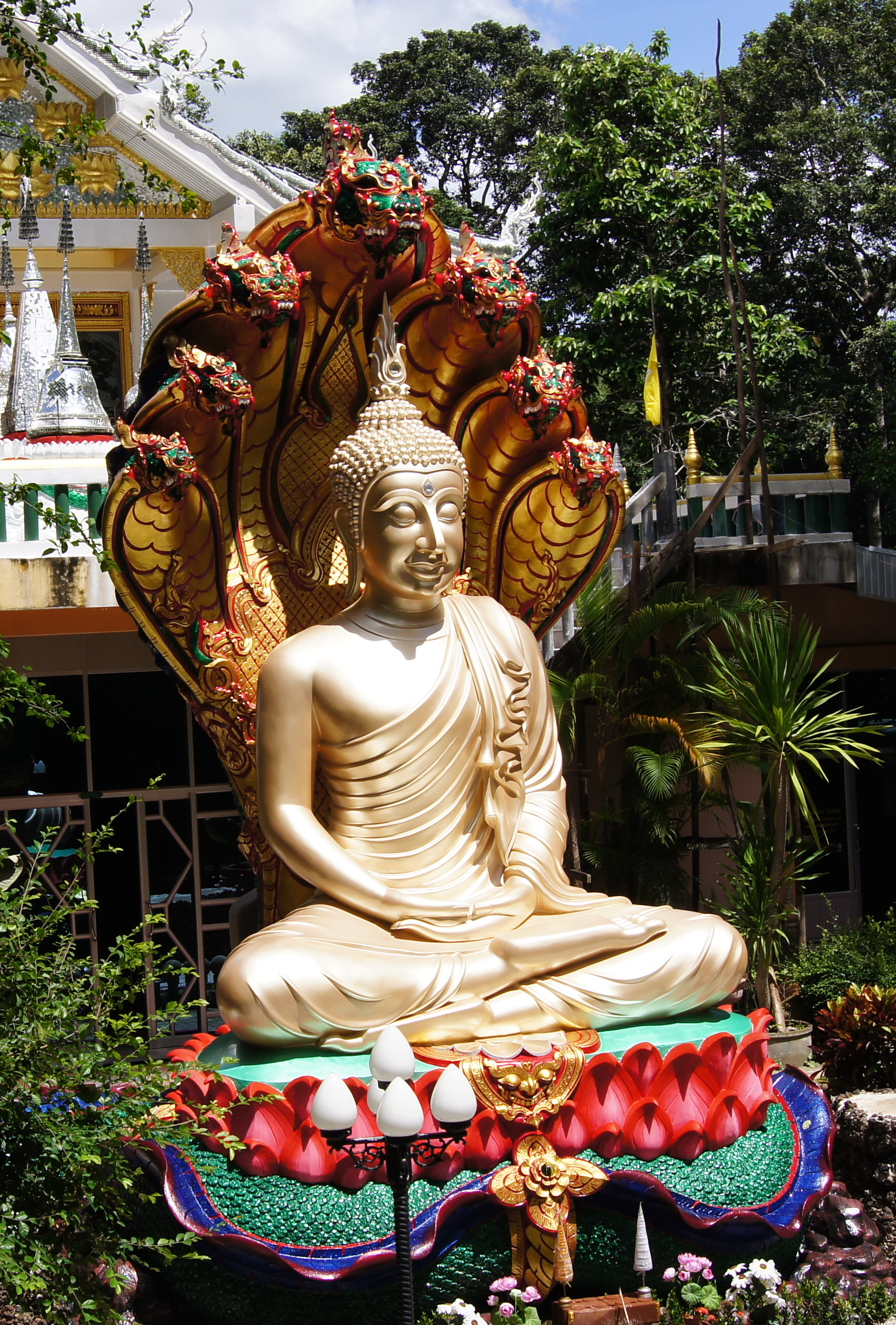 พระพุทธรัตนมงคลสมเด็จ หลวงพ่อนาคองค์แสน